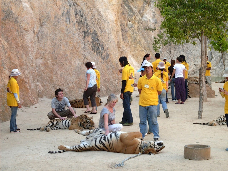 Kanchanaburi Kaplan Tapinagi.